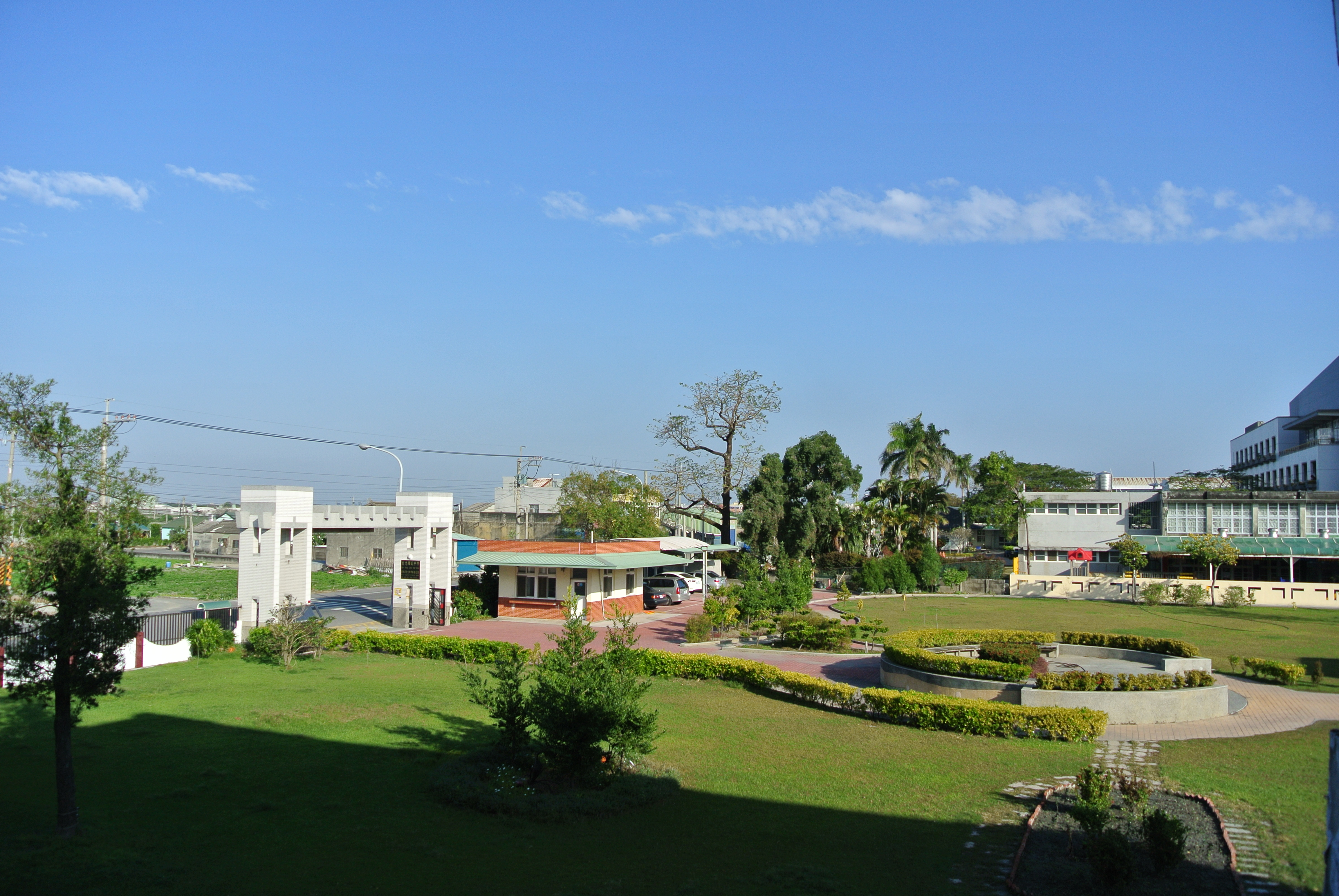 中文（台灣）: 褒忠國中校園一景。